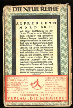 Alfred Lemm: Mord. 2 Bände. München, Roland Verlag, 1918. Vom Verlag Die Schmiede übernommenes Restexemplar